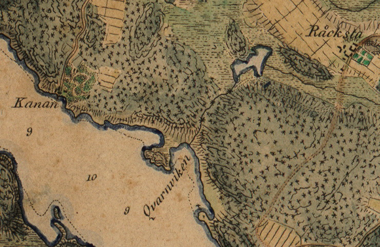 Del av W.M. Carpelans karta över Stockholms omgivningar visande Kvarnviken 1817